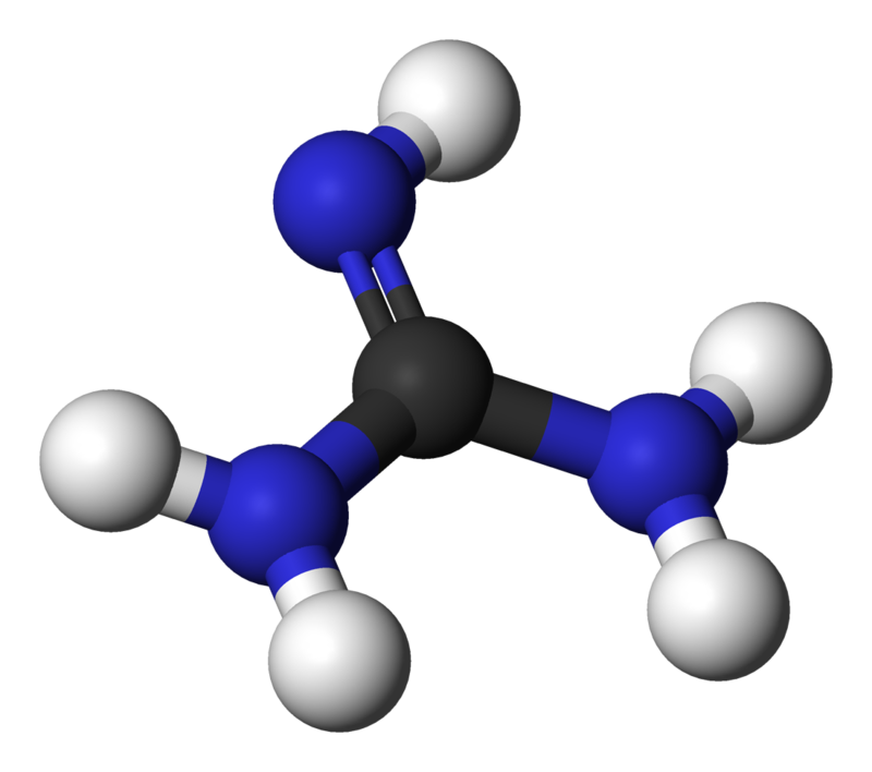 Quanidin 3D